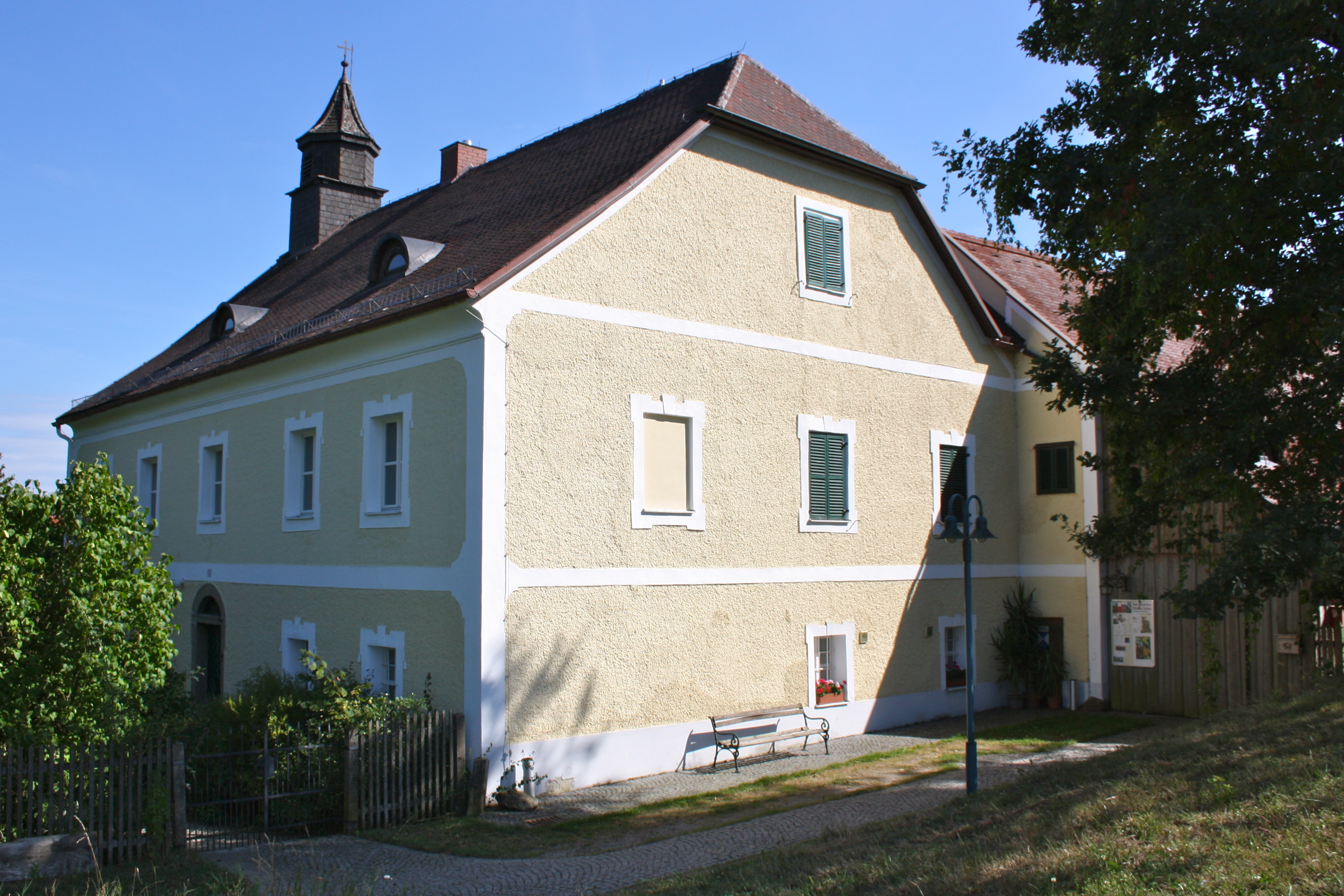 Museum, Kubin-Haus